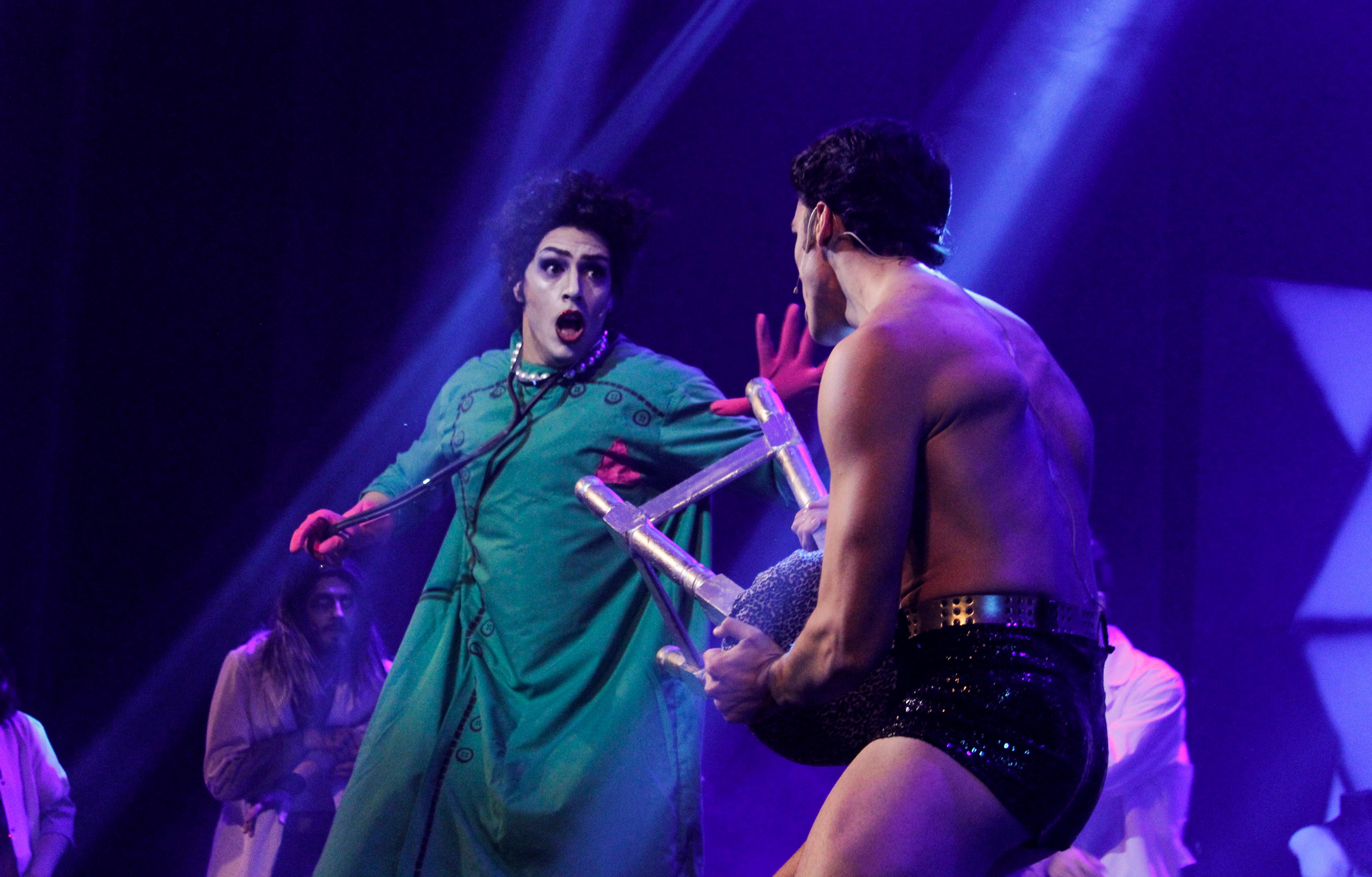 Teatro Maipo (Buenos Aires, Argentina) - 2017